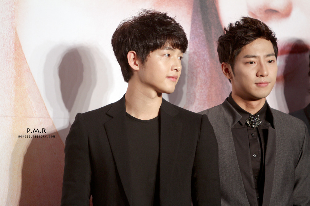 2012년 9월 5일 착한남자 제작 발표회에서.